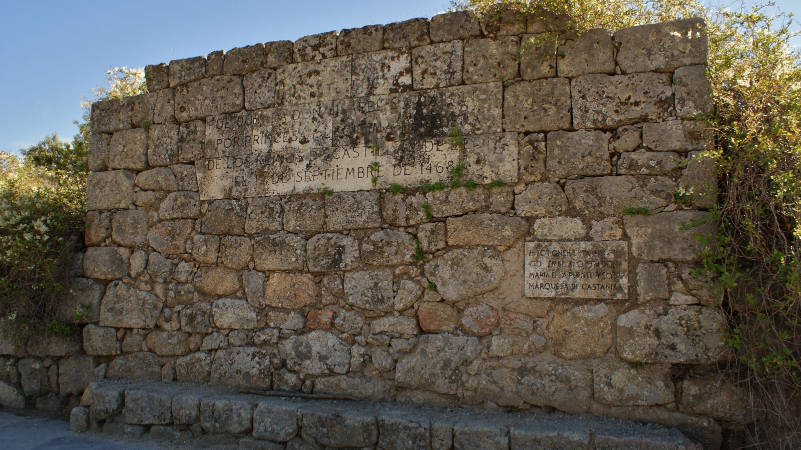 Toros de Guisando, conjunto escultórico vetón (siglo II a. de C.) y entorno donde se firmó el Tratado de Guisando entre el rey de Castilla Enrique IV y su hermanastra Isabel, futura reina de Castilla, ubicados en las inmediaciones del cerro de Guisando, del que toman nombre. Término municipal de El Tiemblo, Ávila. Comunidad Autónoma de Castilla y León.